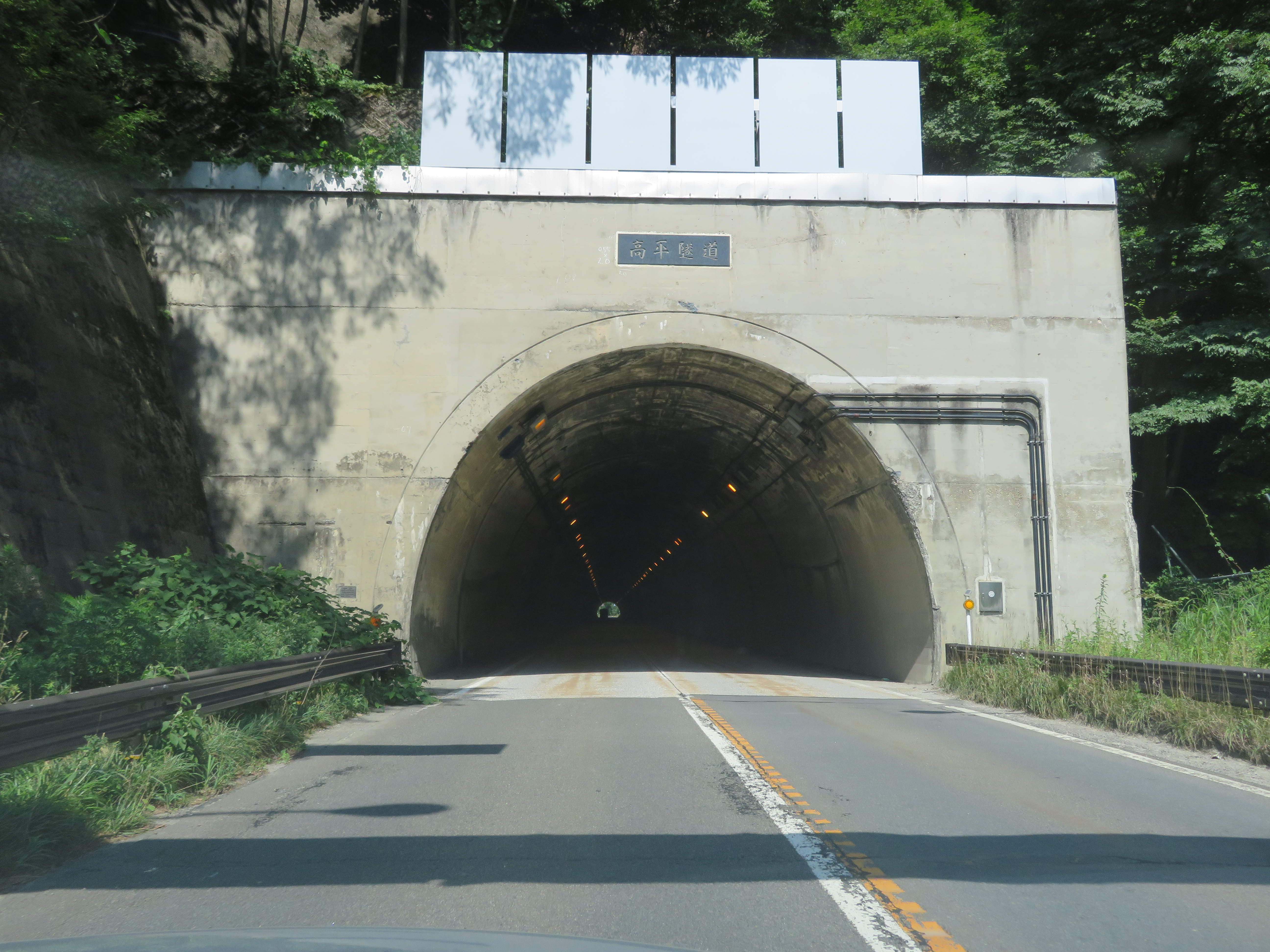 国道13号線高平トンネル（福島市側坑口付近を撮影） Canon PowerShot SX720 HS